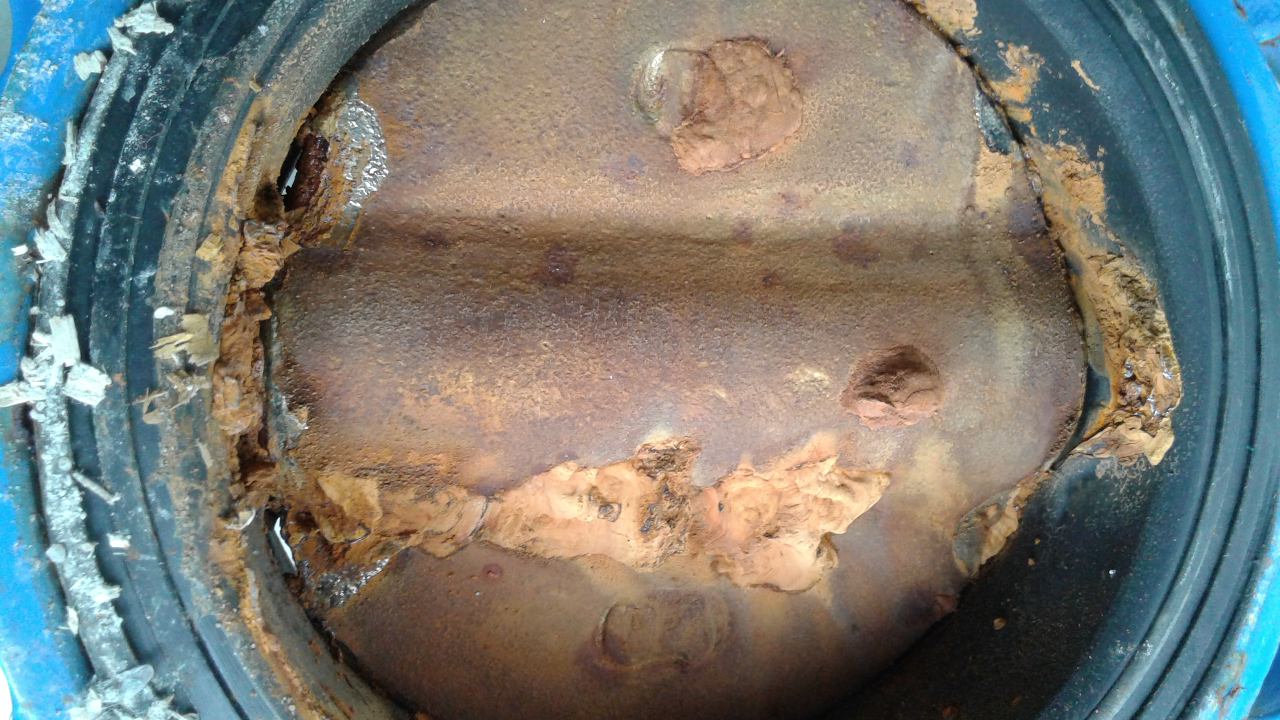 корозія металу